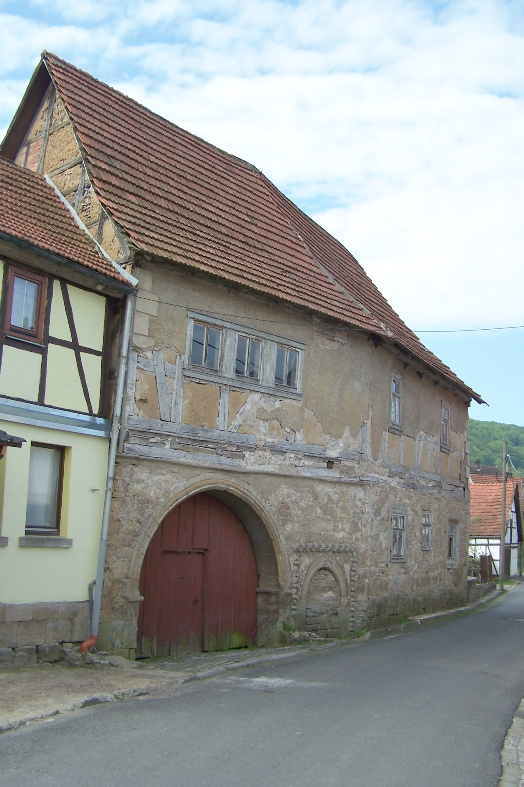 Teilansicht des Keudelschen Schlosses in Falken - heute Theodor-Neubauer-Straße.